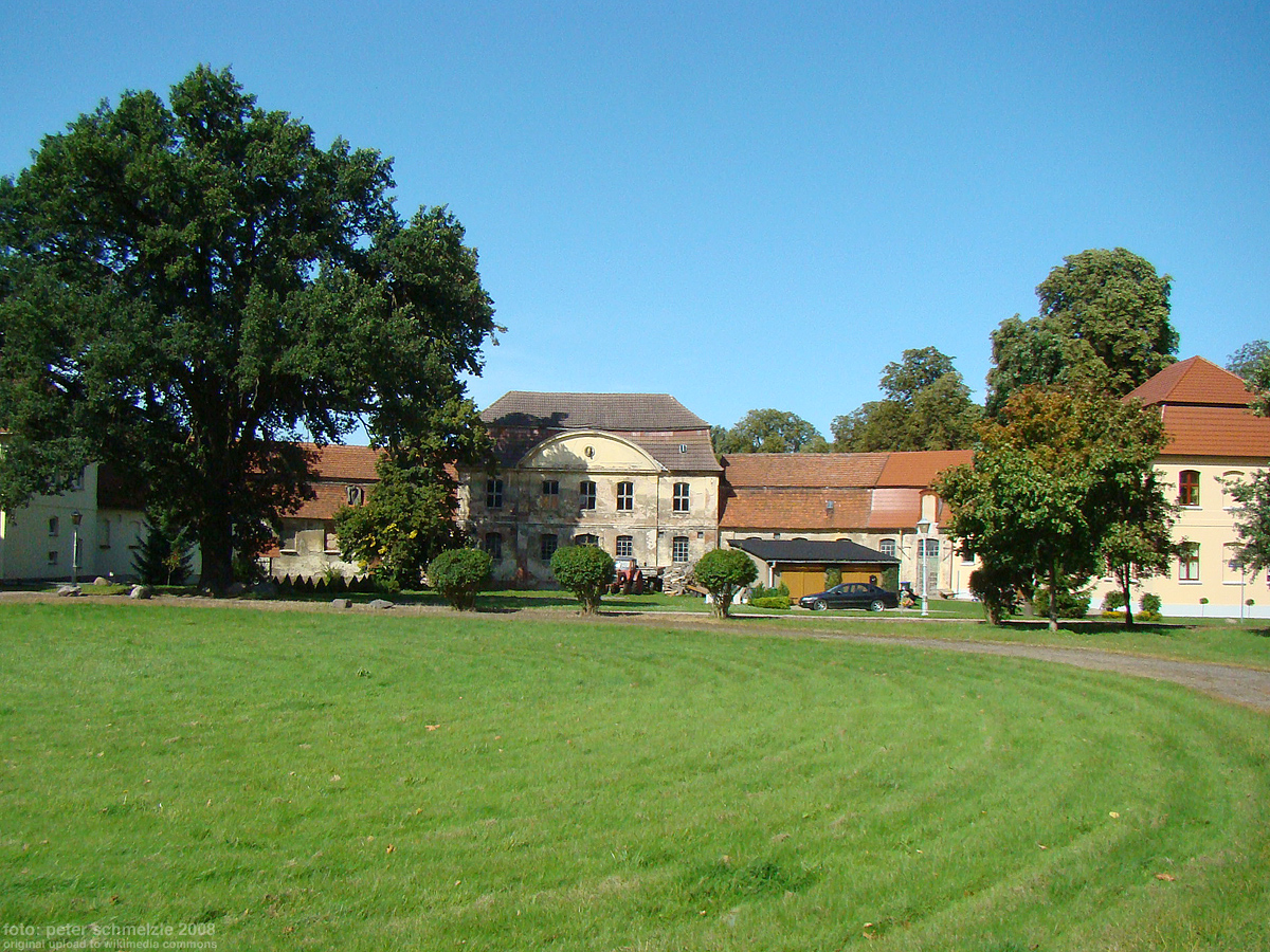 Marstall beim Schloss Ivenack